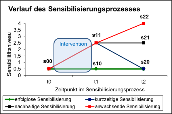 Stufen im Sensibilisierungsprozess